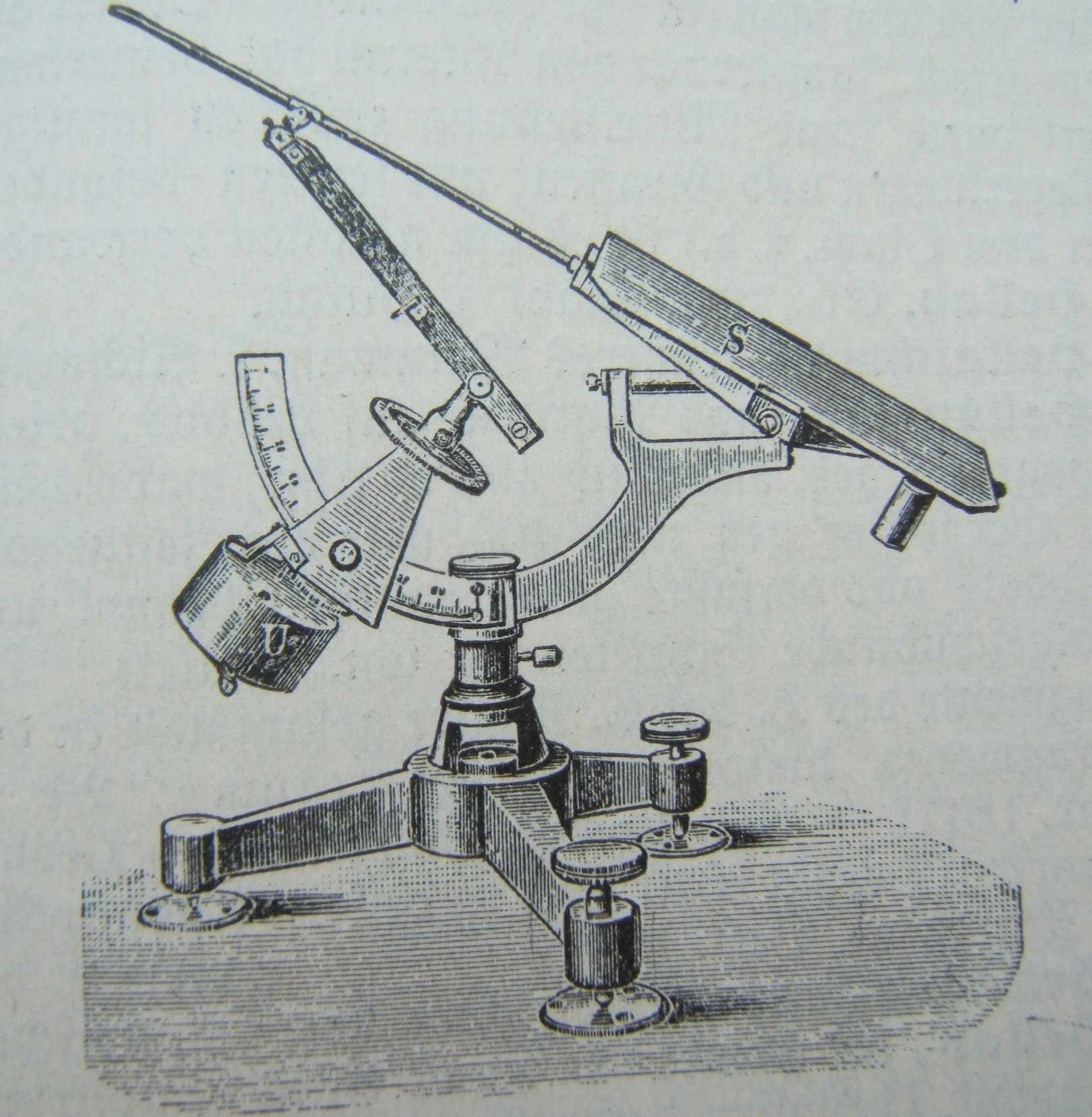 Eigenaufnahme - aus Brockhaus 14. A. 1908 - siehe EXIF